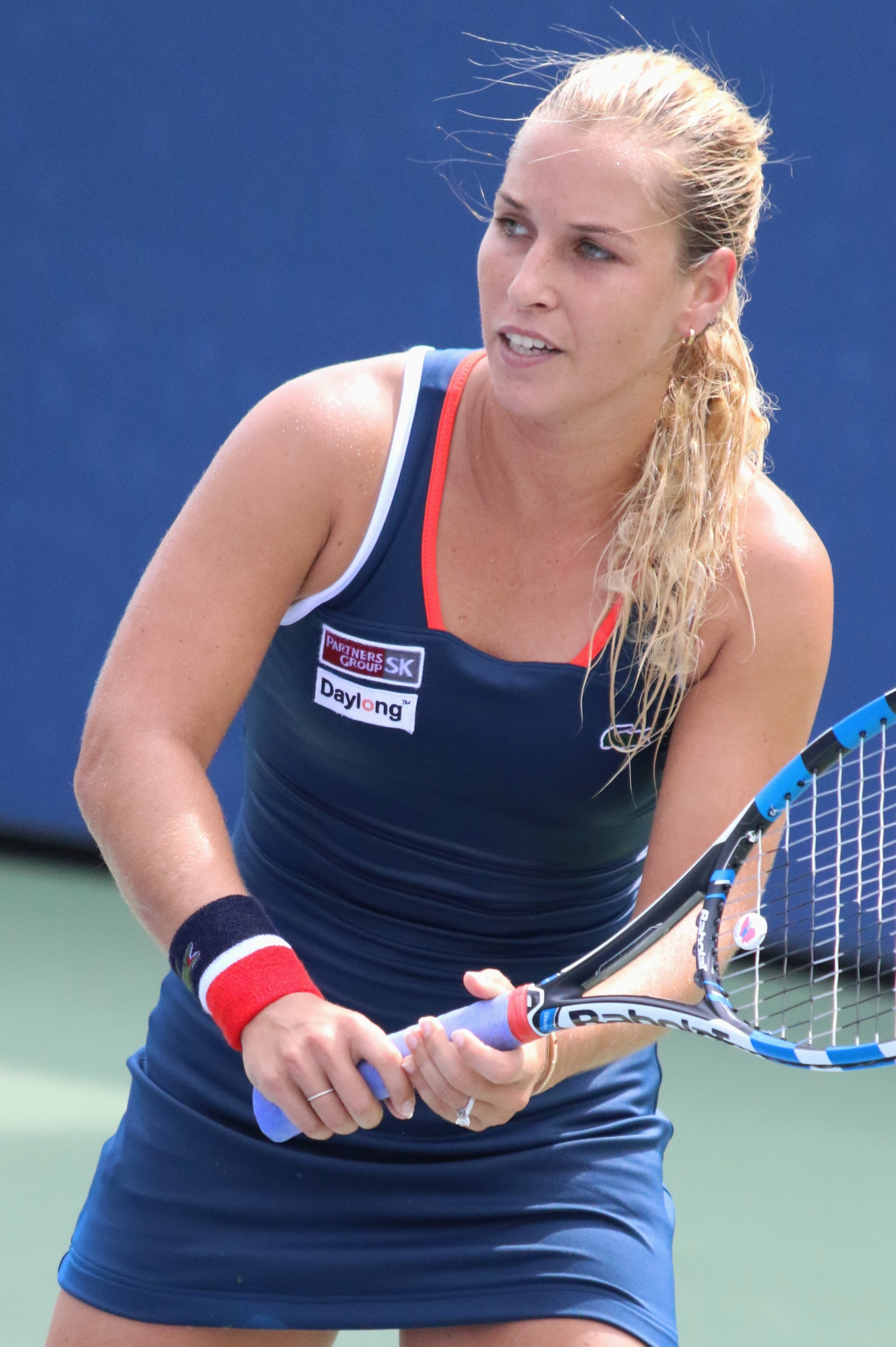 Cibulkova US16 (28)